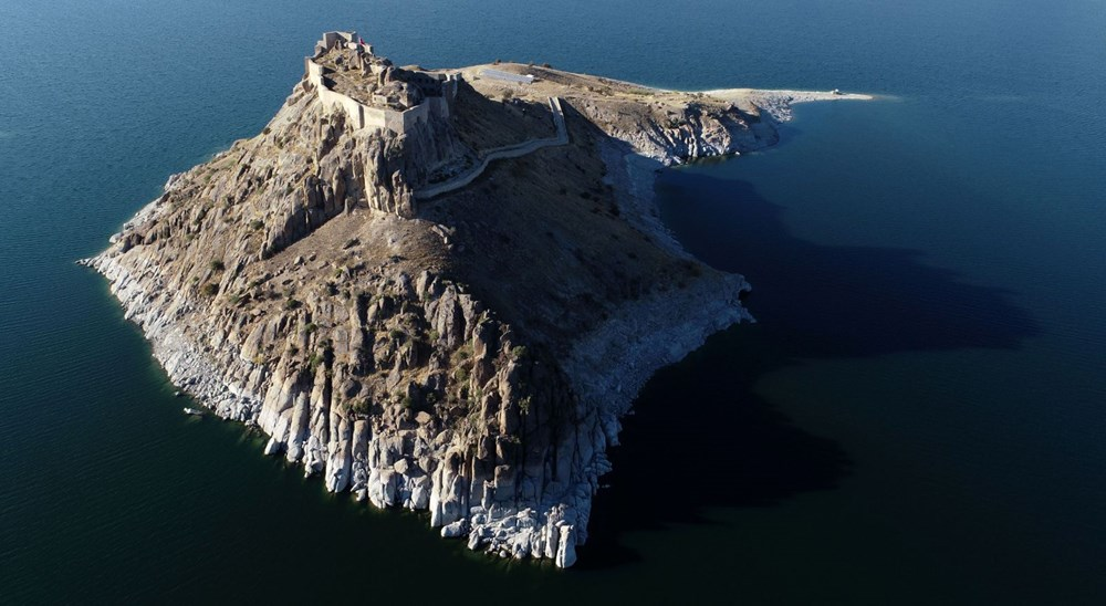 Château de Pertek se trouvant sur l'Euphrate.